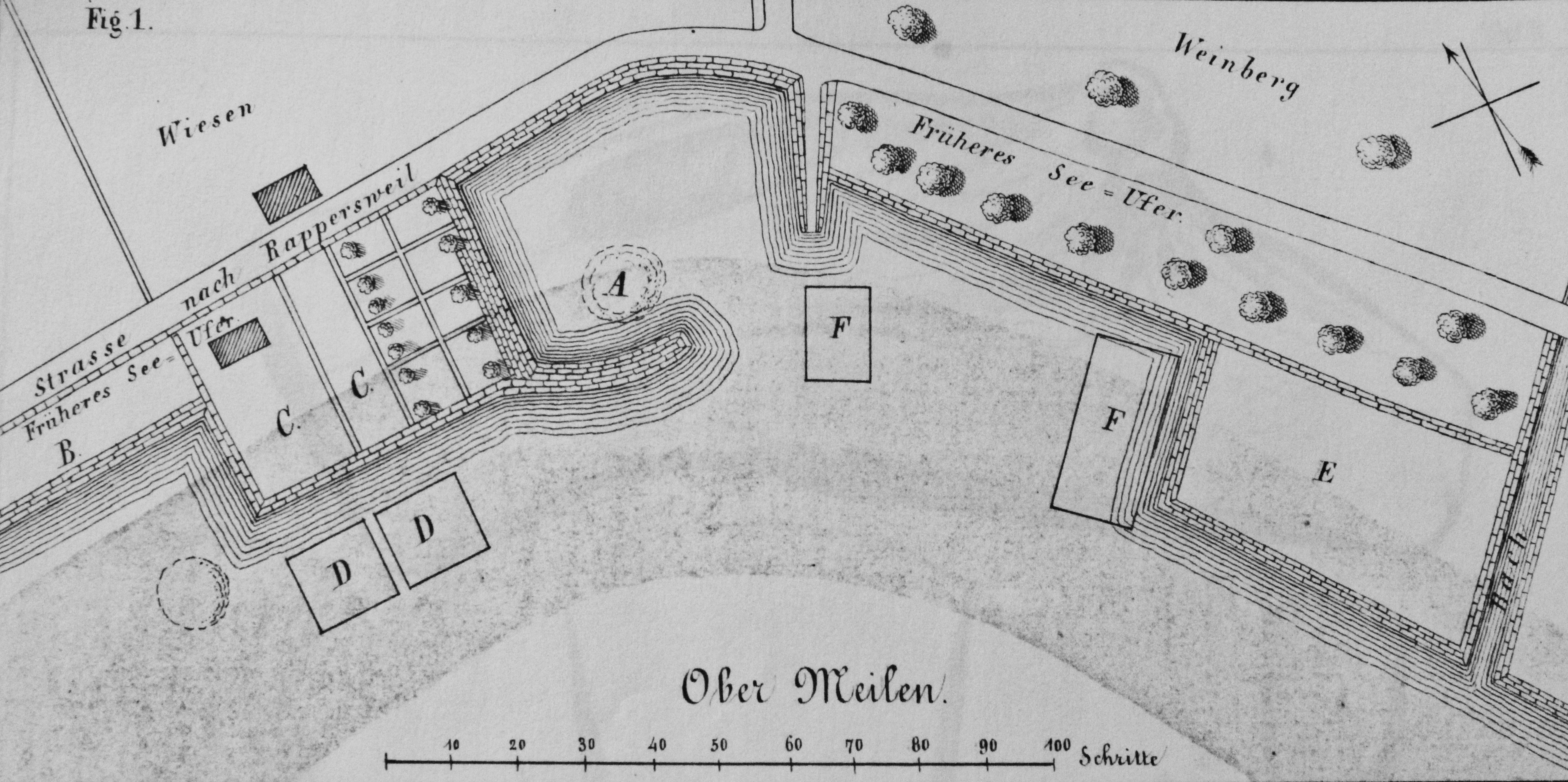 Plan de la baie d'Ober-Meilen dans laquelle ont été réalisée des découvertes lacustres au XIXème siècle